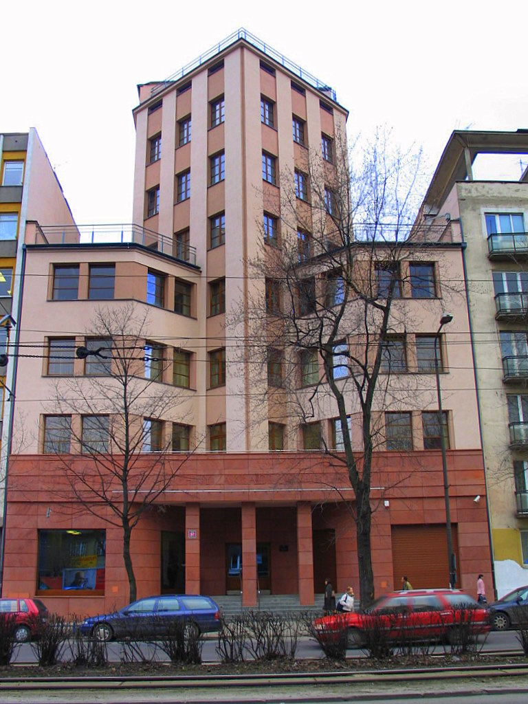 budynku I Inspektoratu PZU S.A. Al. T. Kościuszki 57